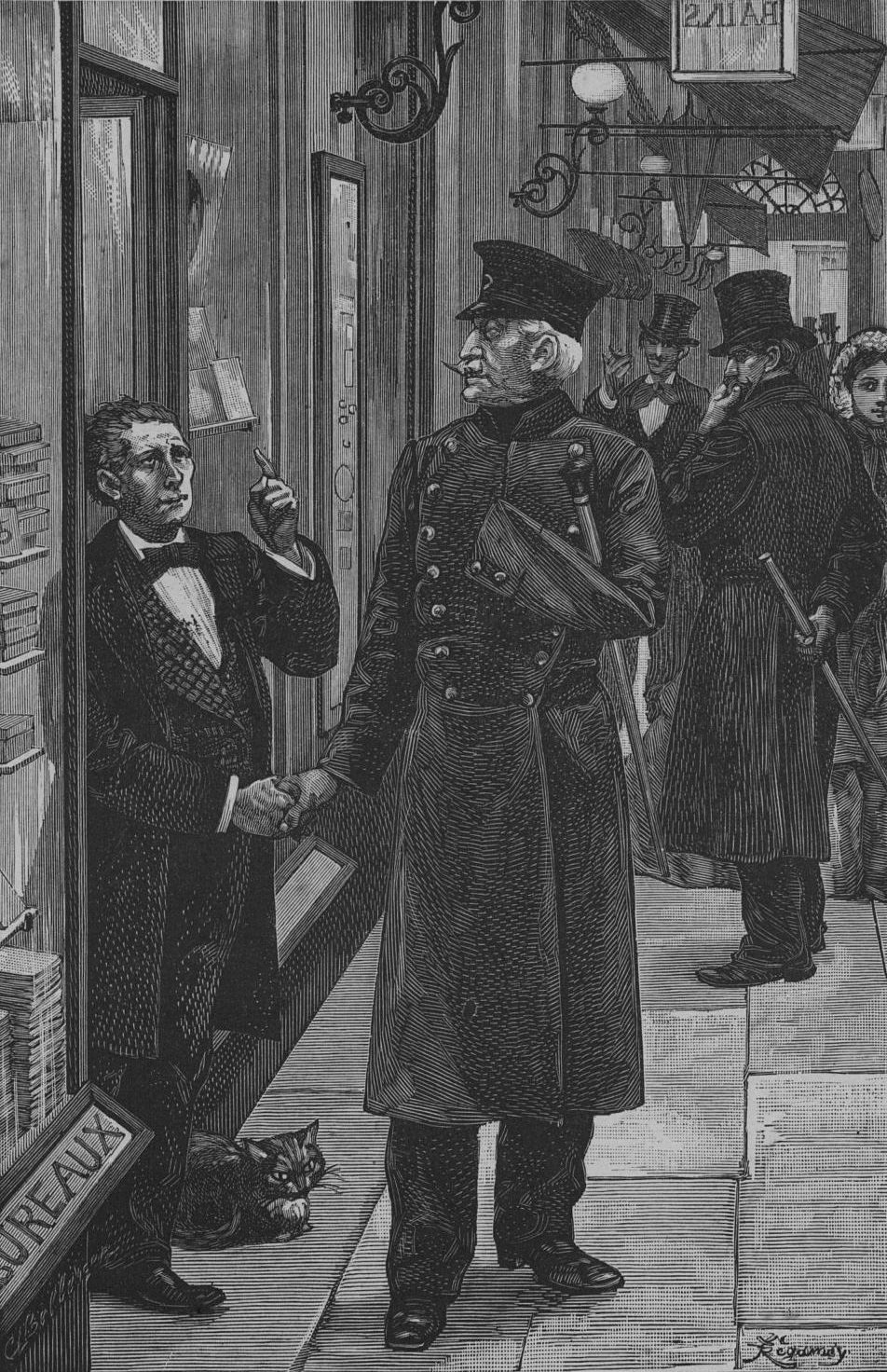 "Fig. 28. - Un papetier, du passage Choiseul, nommé Jeanne, donne rendez-vous aux conspirateurs, qui doivent enlever le fort de Vincennes au profit du parti légitimiste (page 155)".